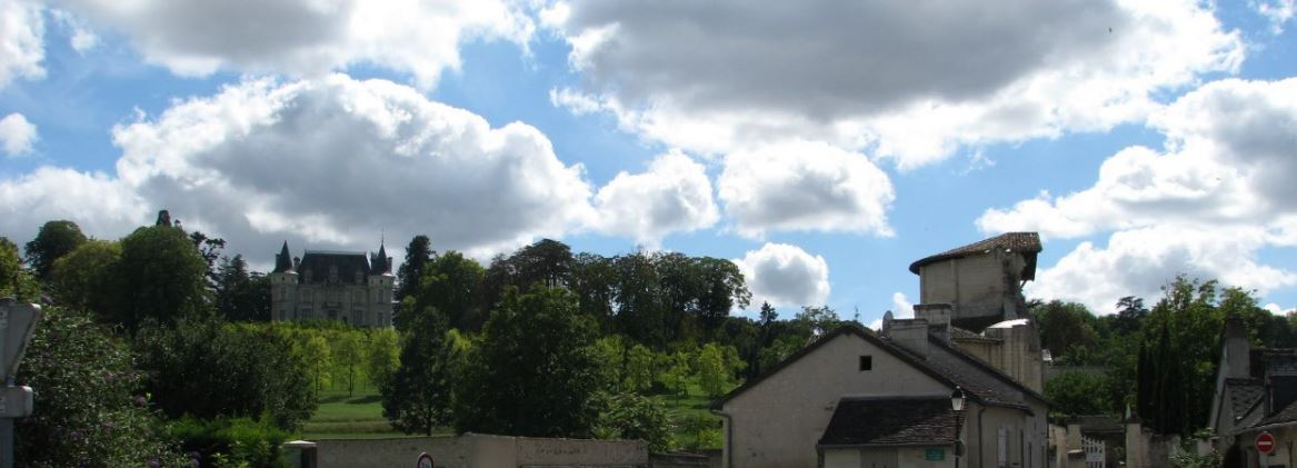 Vue sur le Prieuré Saint-Léonard à L'Île-Bouchard et le château du Temple depuis la place de Verdun